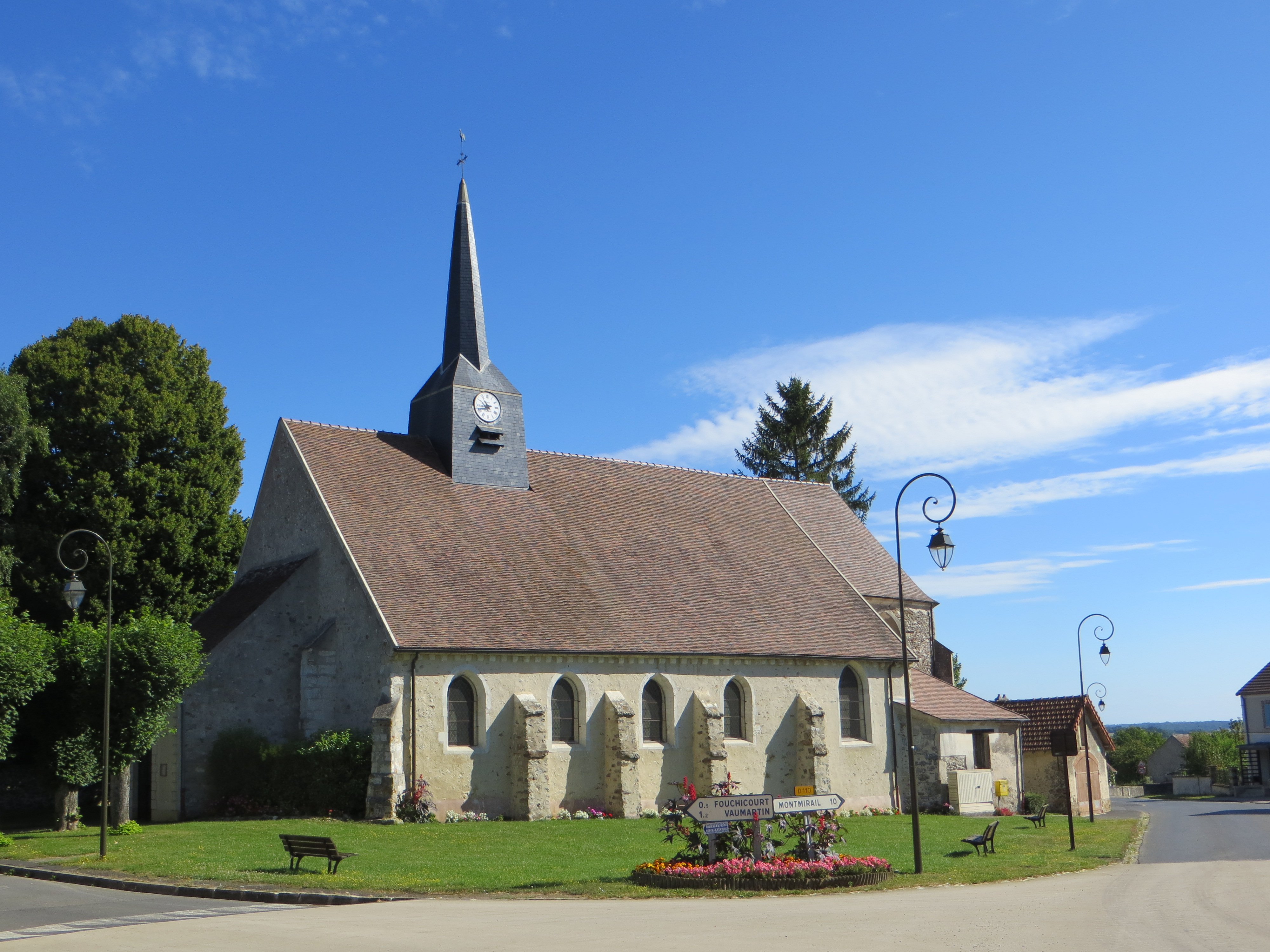 Vue générale de l'église